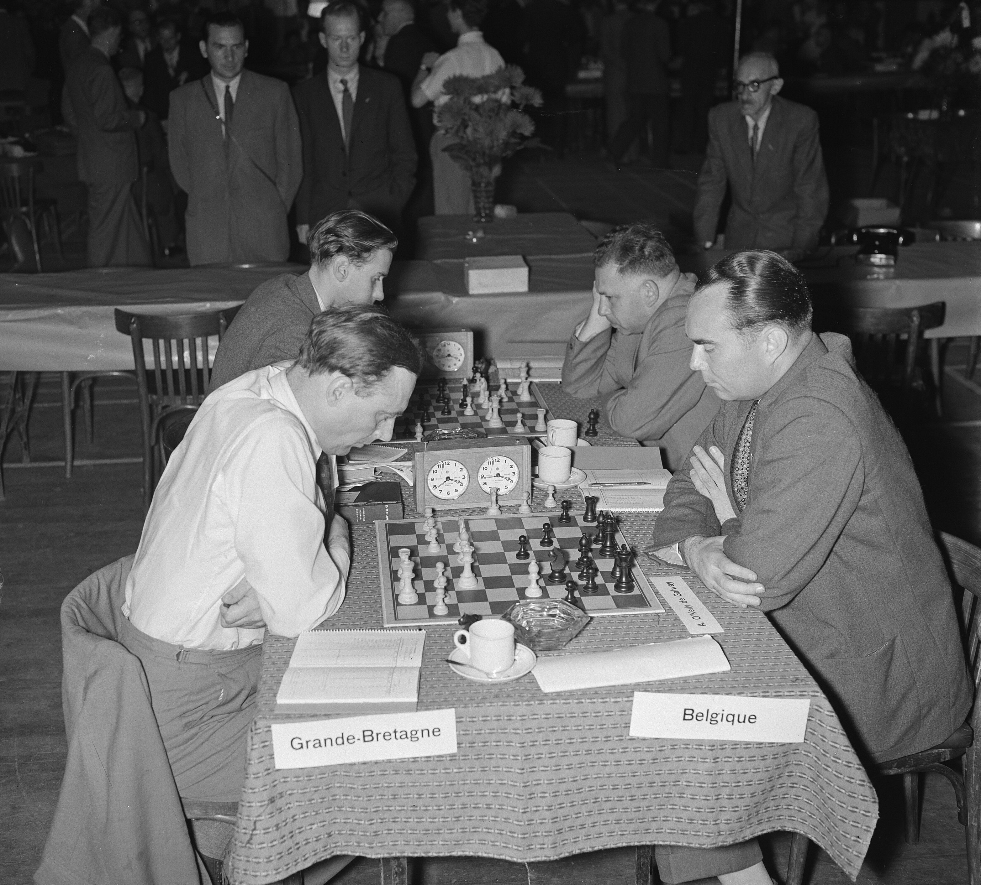 Collectie / Archief : Fotocollectie Anefo Reportage / Serie : [ onbekend ] Beschrijving : Aanvang schaaktoernooi Amsterdam Datum : 4 september 1954 Locatie : Amsterdam, Noord-Holland Trefwoorden : SCHAAKTOURNOOIen Fotograaf : Rossem, Wim van / Anefo Auteursrechthebbende : Nationaal Archief Materiaalsoort : Glasnegatief Nummer archiefinventaris : bekijk toegang 2.24.01.09 Bestanddeelnummer : 906-6985